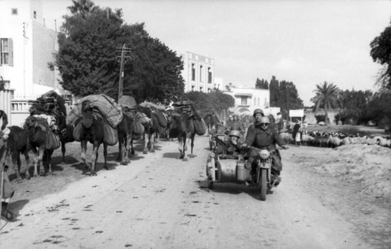 Scherl Bilderdienst Deutsche Fallschirmjäger in Tunis. Nach kurzem Aufenthalt geht es bereits weiter, an Kamelherden der Araber vorbei. PK-Kriegberichter Arppe; November 1942 632-43